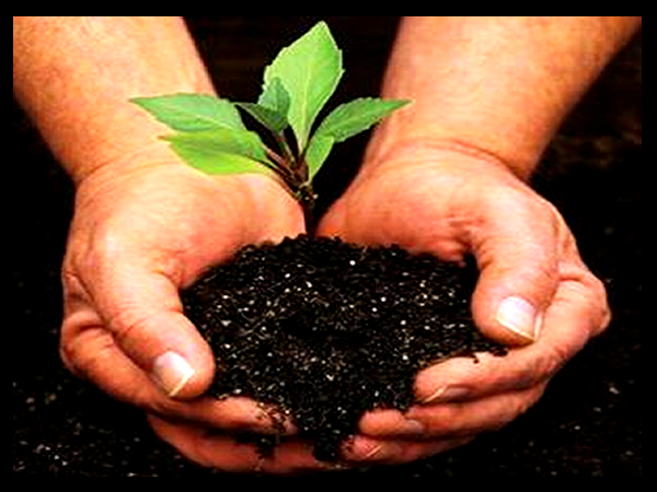 reacciona ecuador y todo el mundo entero nuestro planeta se nos va a acabar y todos queremos un lindo futuro para nuestros hijos. Y LOS HIJOS DE NUESTROS HIJOS